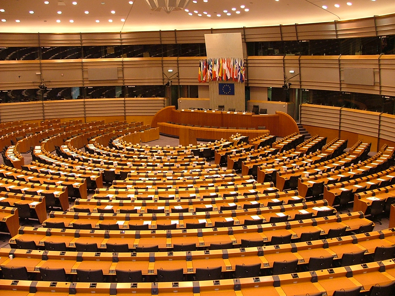 Belgium, Bruxelles - Brussel, European Parliament Pl: Belgia, Bruksela, Parlament Europejski